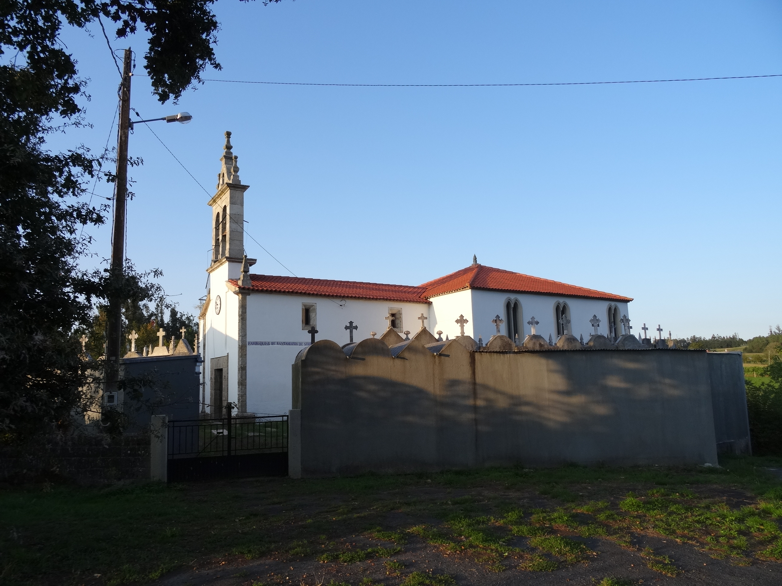 Igrexa de Novela, Santiso, provincia da Coruña.